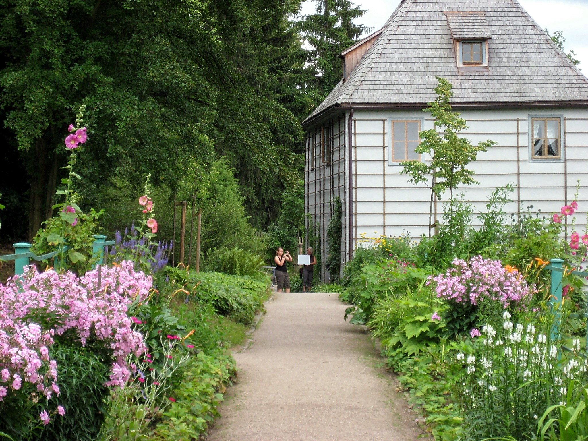 Goethes Gartenhaus